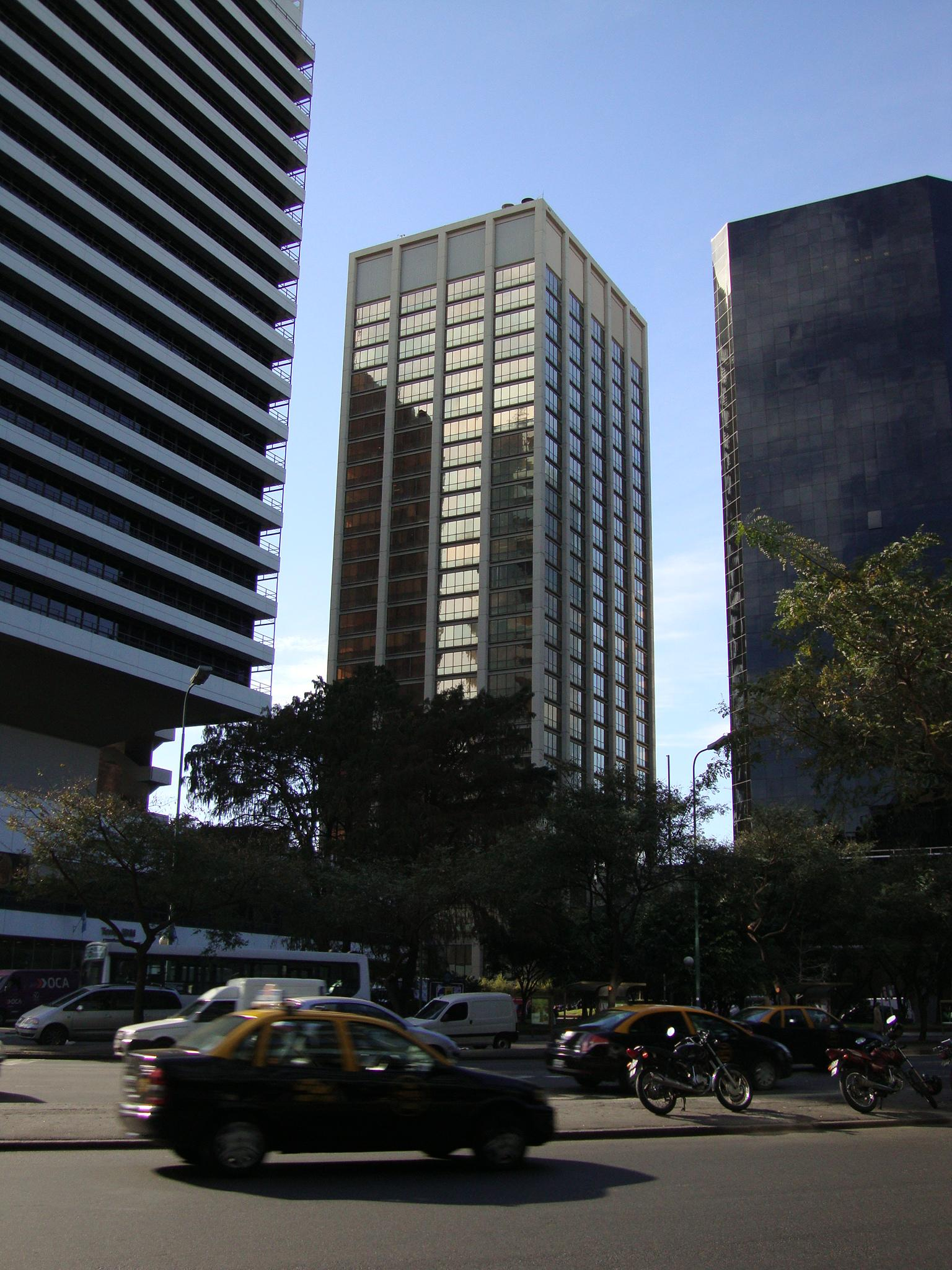 La Torre Madero, uno de los edificios del conjunto Catalinas Norte del barrio de Retiro, en Buenos Aires, Argentina.